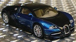 Autoart modelauto van een Bugatti EB 16.4 Veyron